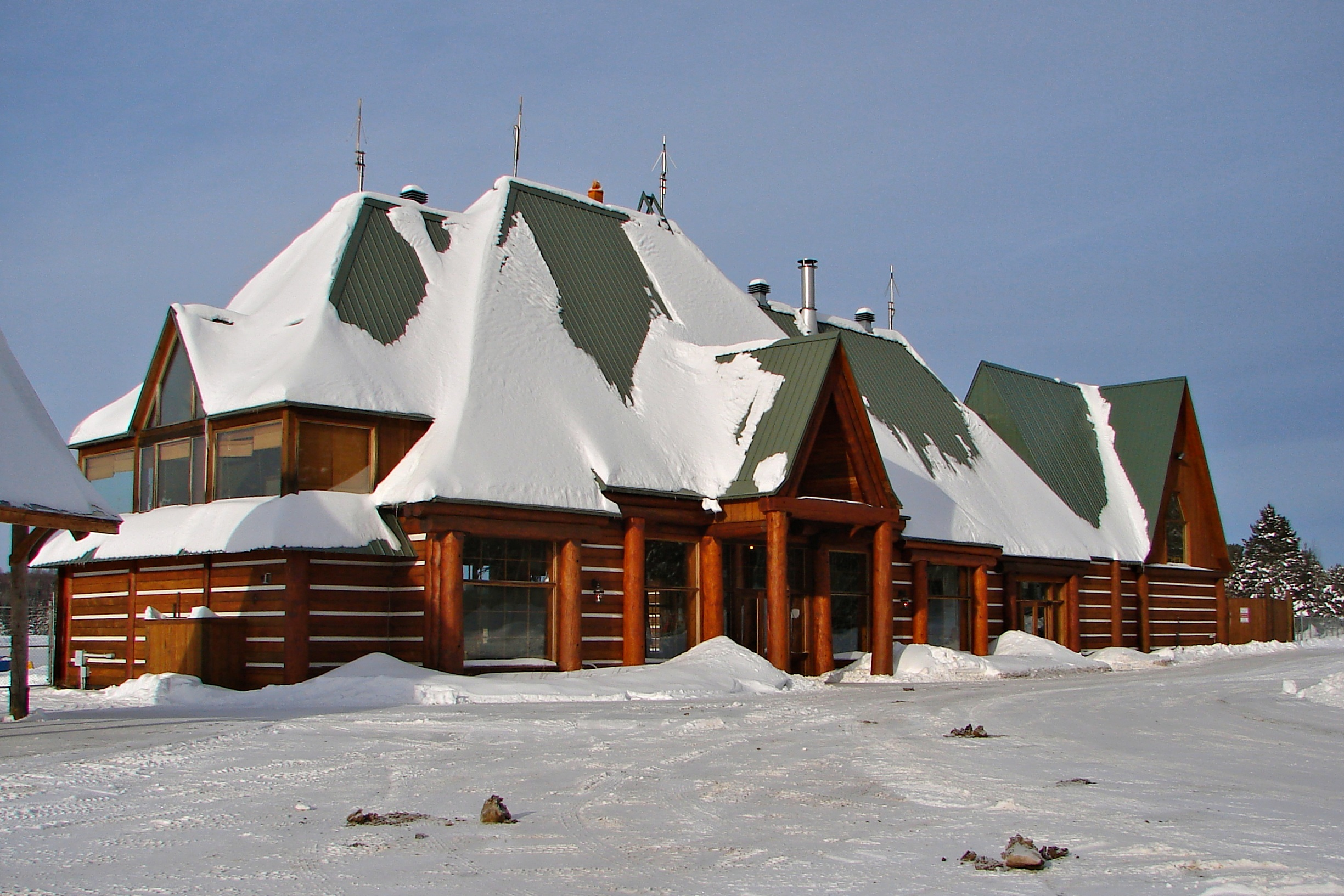 La Macaza – Mt. Tremblant Airport, Quebec, Canada